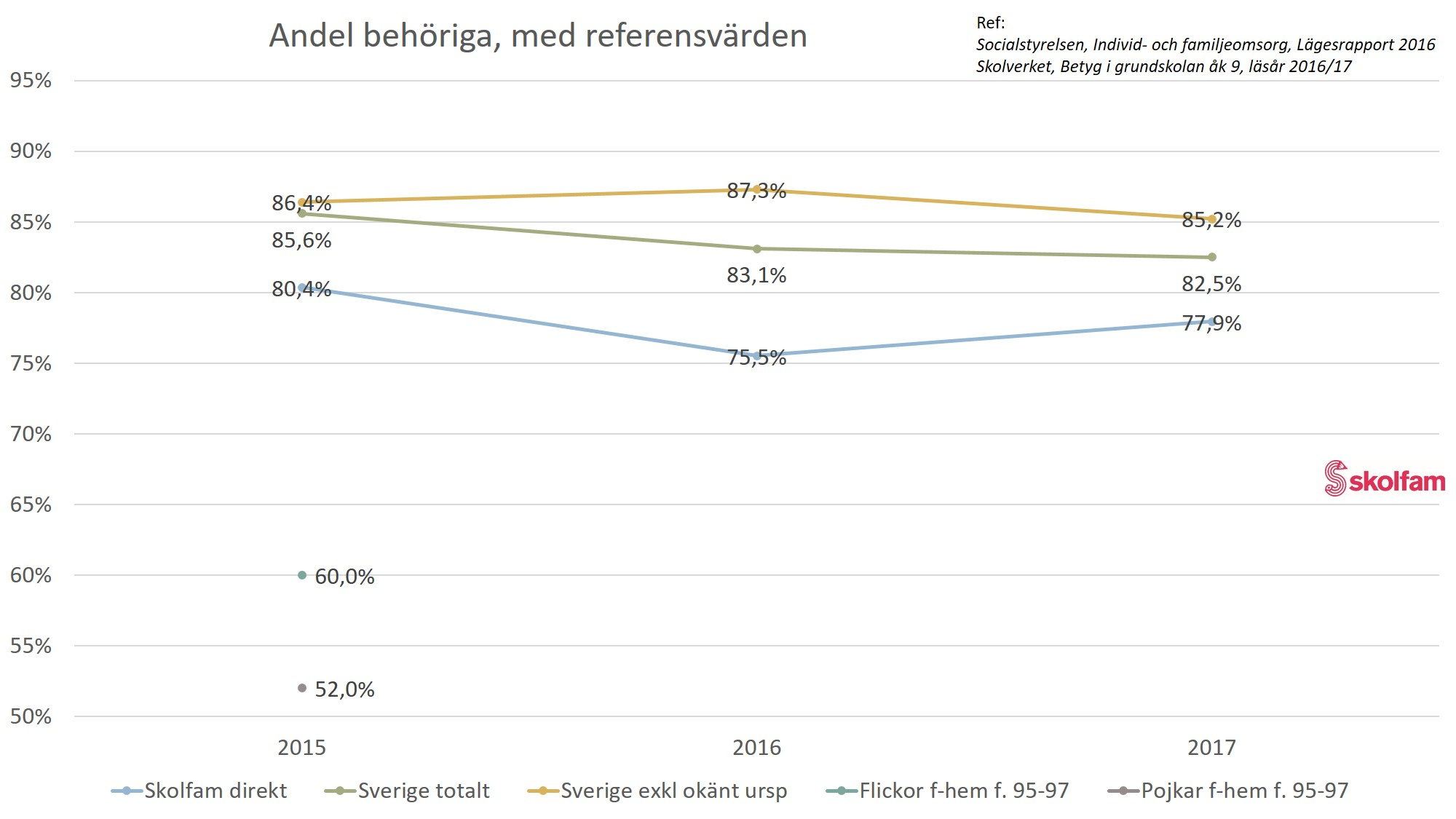 Statistik åren 2013-2017 för familjehemsplacerade elever som fått Skolfam, jämfört med alla i Sverige och alla familjehemsplacerade pojkar resp flickor år 2015.